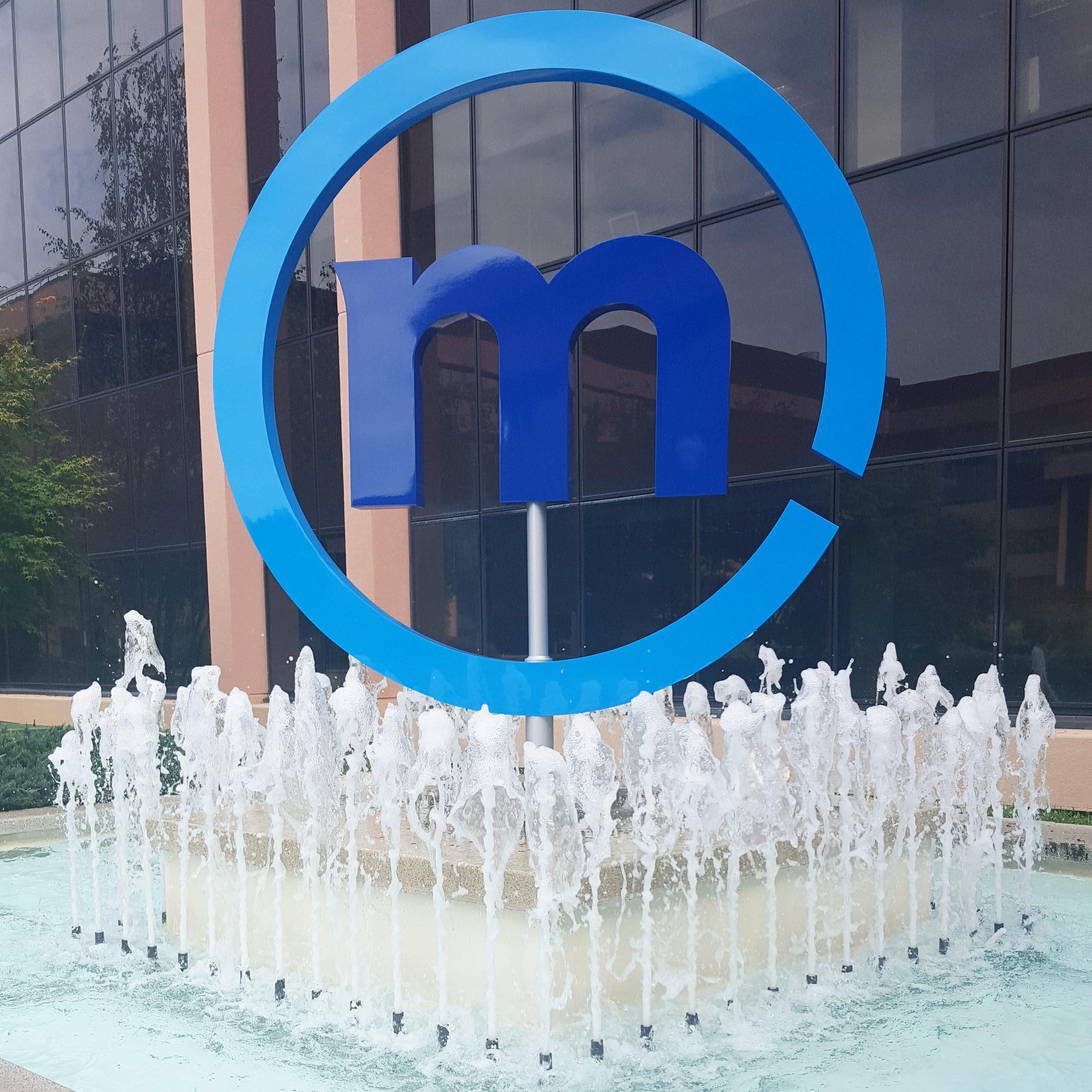 Sede Banca Mediolanum S.p.A, Basiglio, Milano 3.